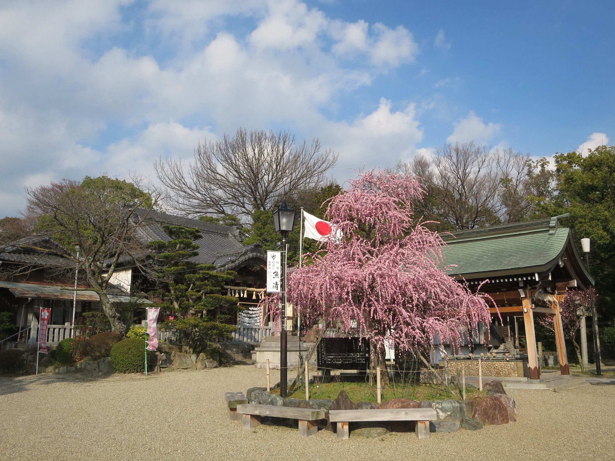 岡崎天満宮（岡崎市中町）